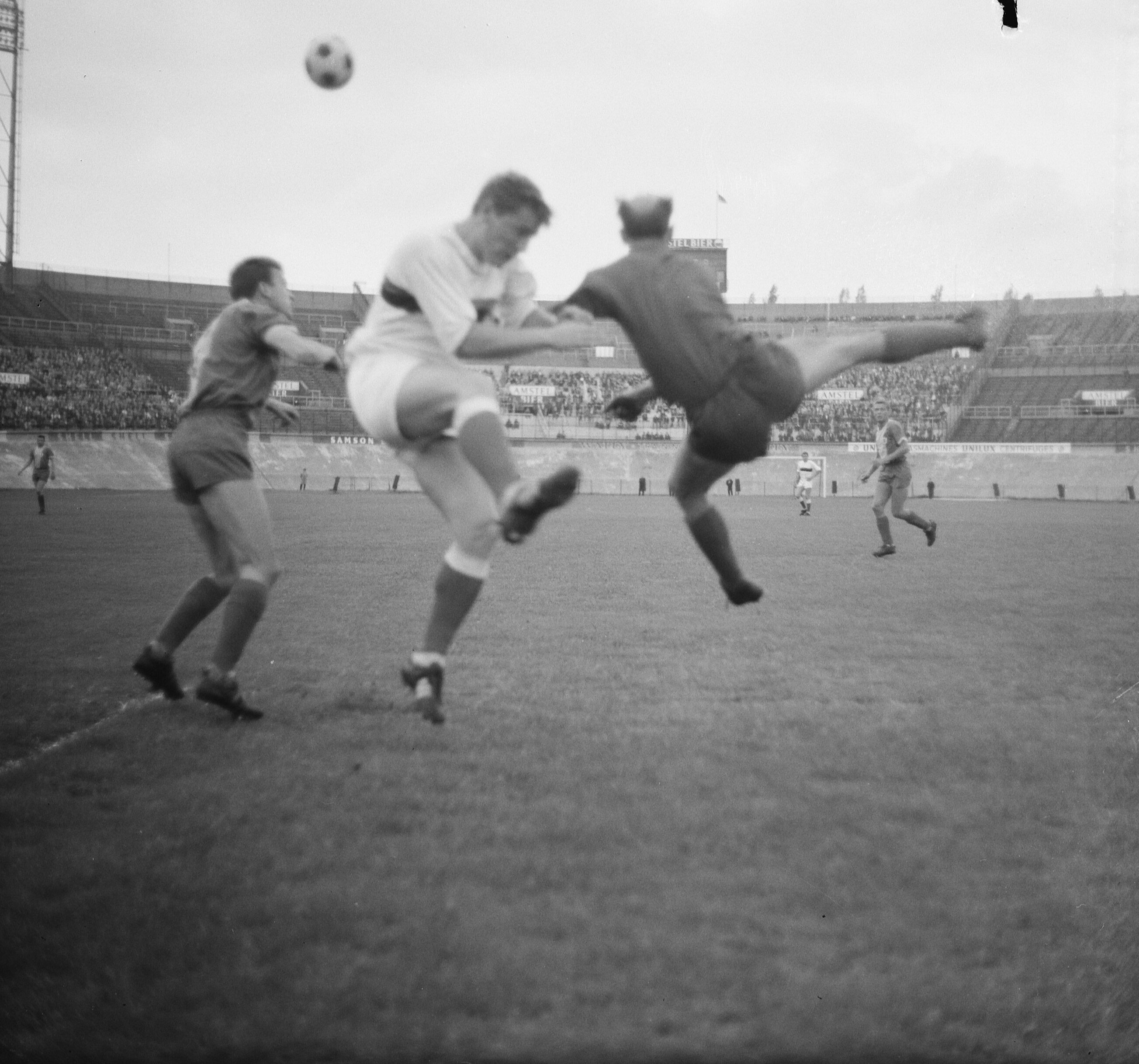 Collectie / Archief : Fotocollectie Anefo Reportage / Serie : [ onbekend ] Beschrijving : DWS tegen Eintracht 4-0, Temming (DWS) in de aanval, rechts keeper Jacher Datum : 14 juni 1964 Trefwoorden : aanvallen, keepers Fotograaf : Nijs, Jac. de / Anefo Auteursrechthebbende : Nationaal Archief Materiaalsoort : Negatief (zwart/wit) Nummer archiefinventaris : bekijk toegang 2.24.01.03 Bestanddeelnummer : 916-5405